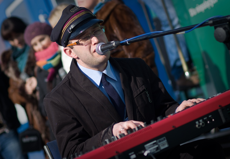 Michał Jurkiewicz (Śrubki - premiera płyty - przed wagonem) 2